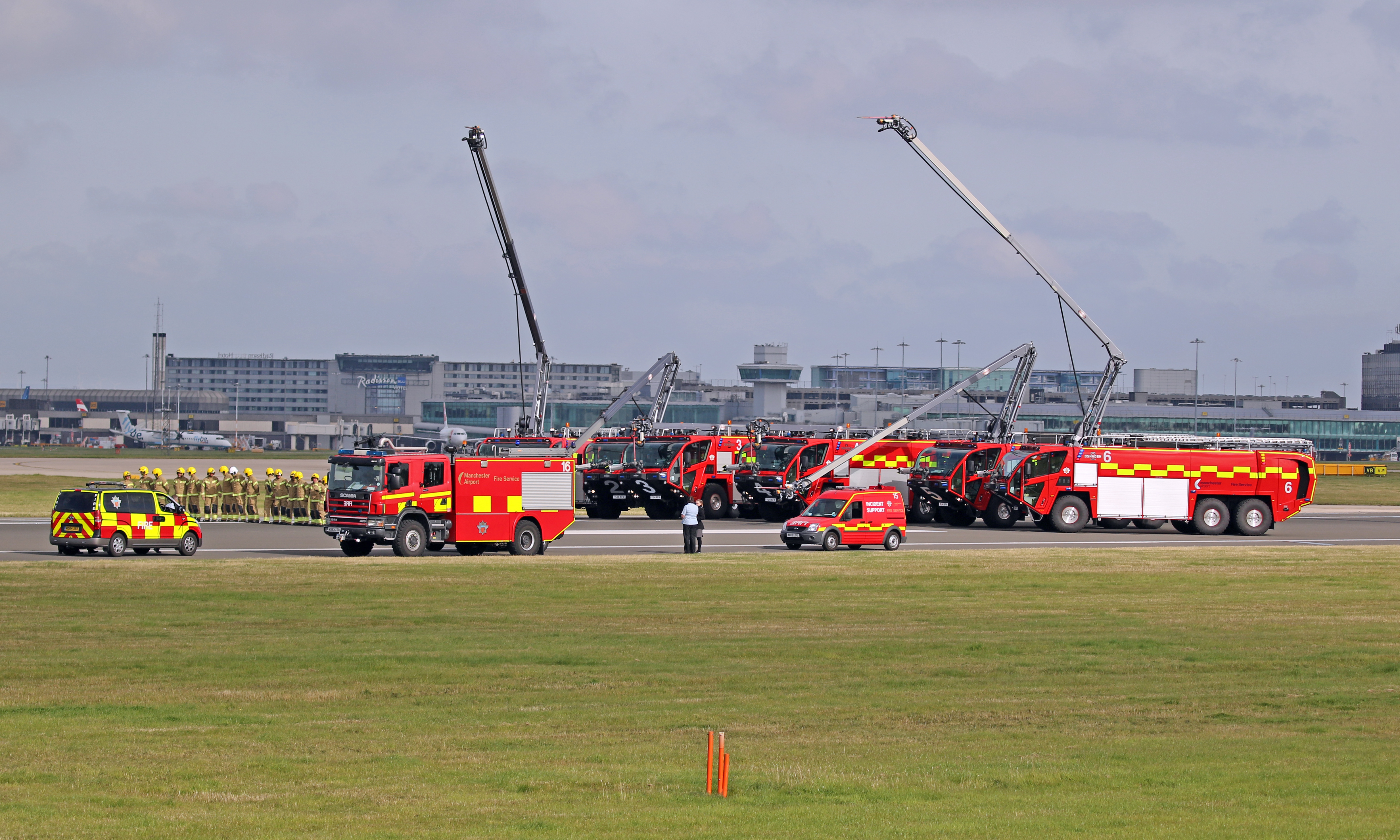 Manchester 28/09/15